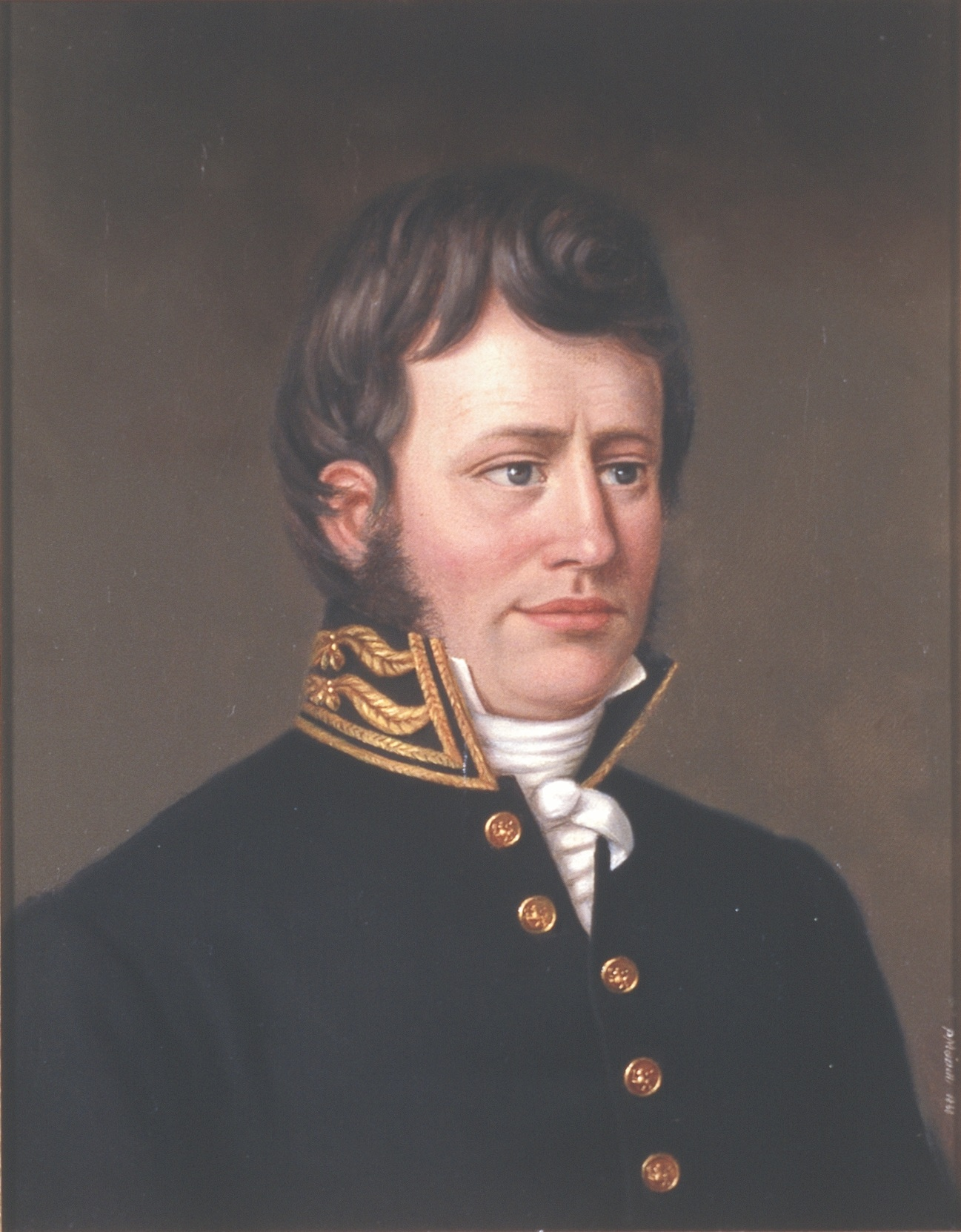 Sort stiftsoverrettsassesoruniform m/løveknapper, stiv oppstående krave m/gullsnorar og bladranker, oppstående hvit flipp, halsbind og sløyfe.